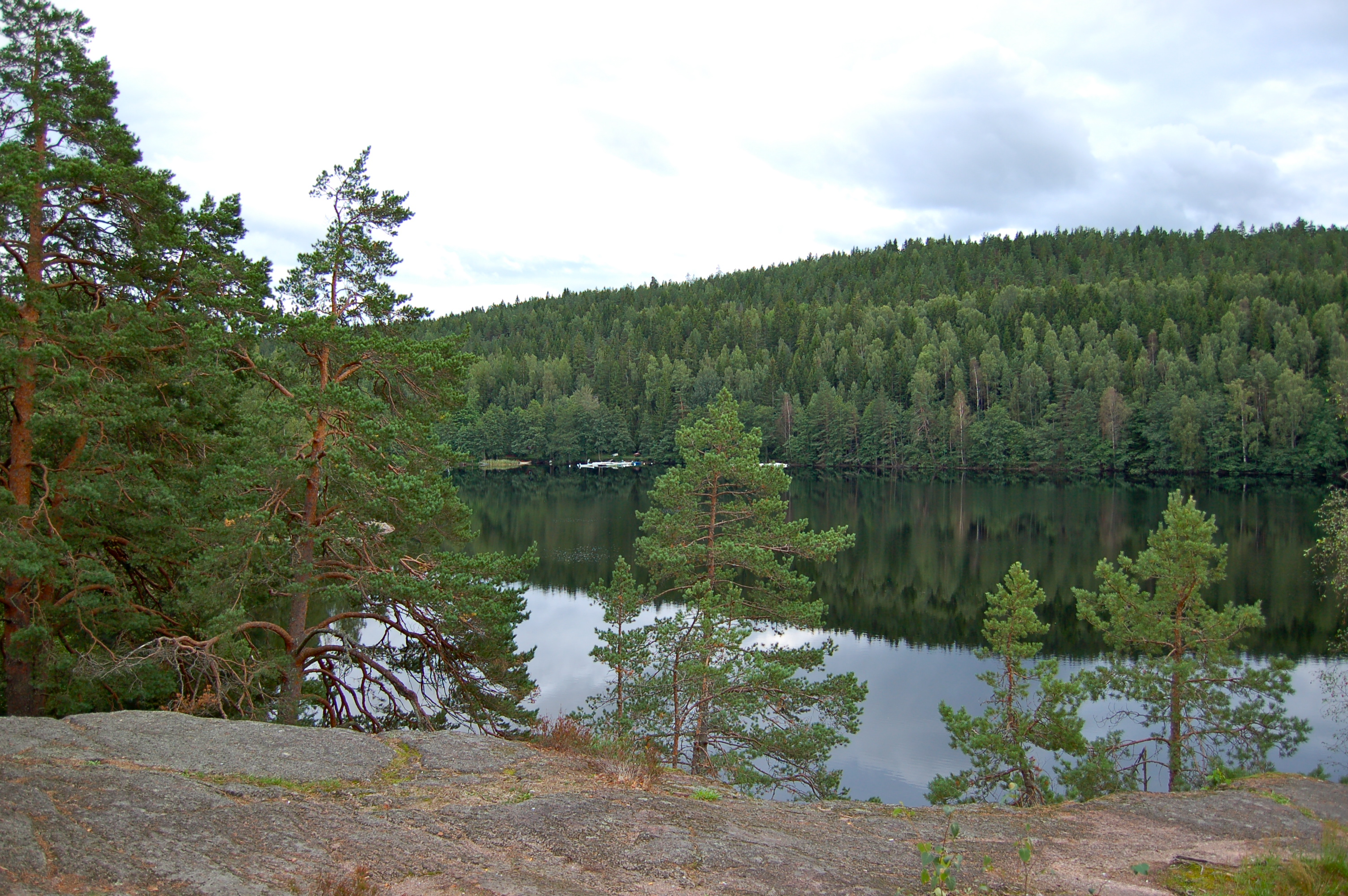 Utsikt mot fiskeläge Kamera Nikon D50, se Metadata för utförlig information